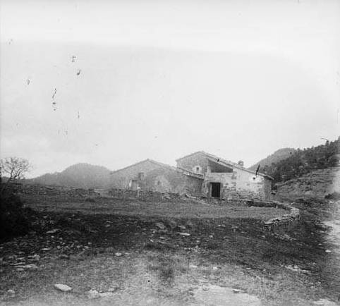 Imatge